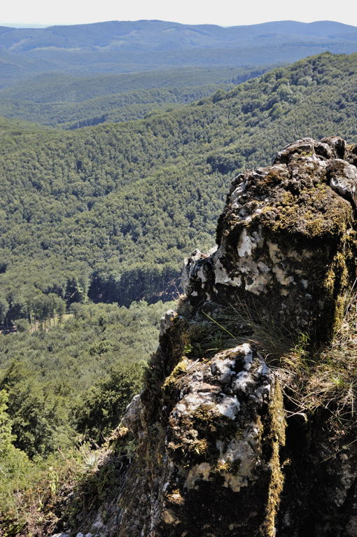 Čierna skala